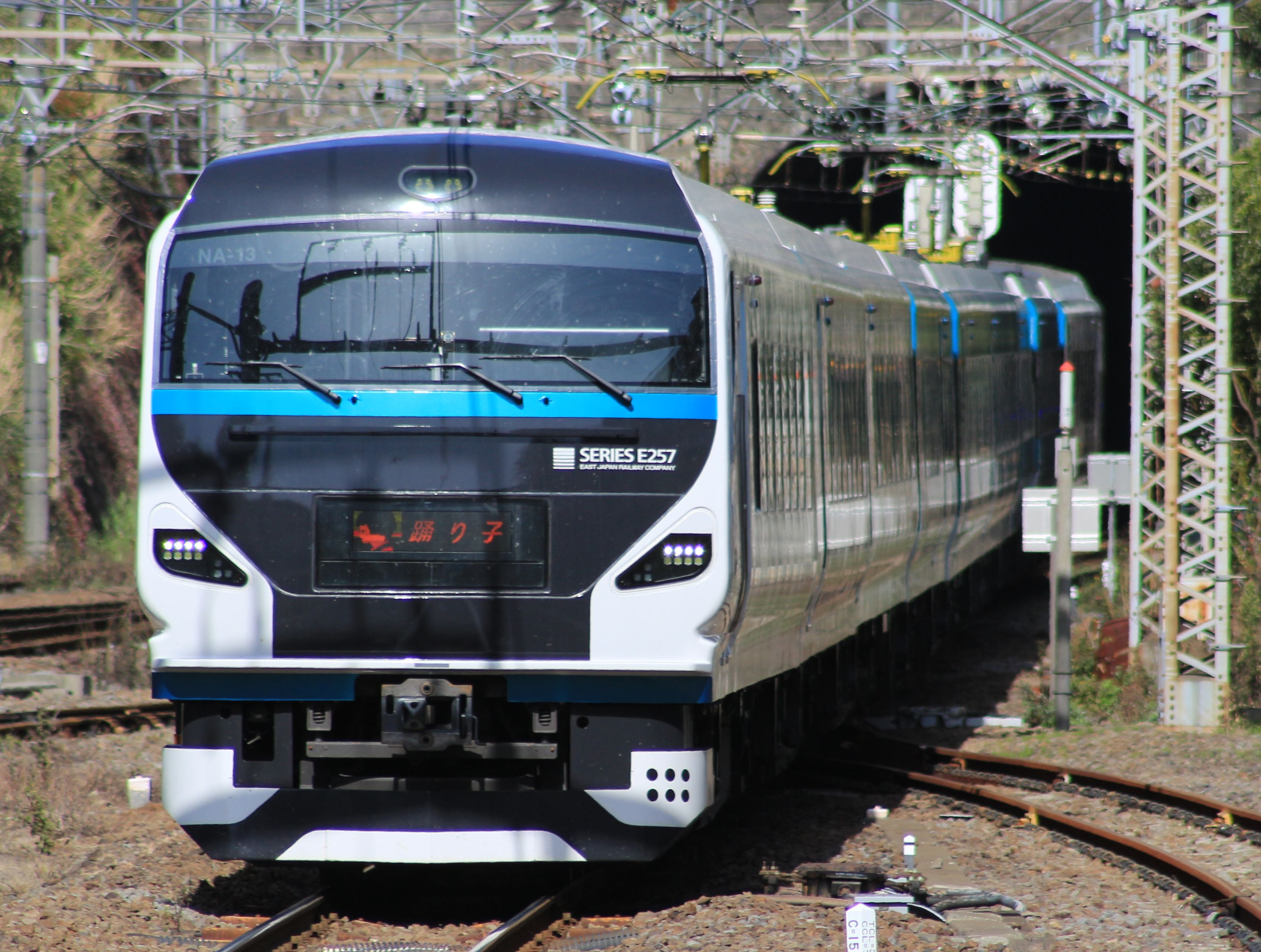 E257系 踊り子 熱海駅